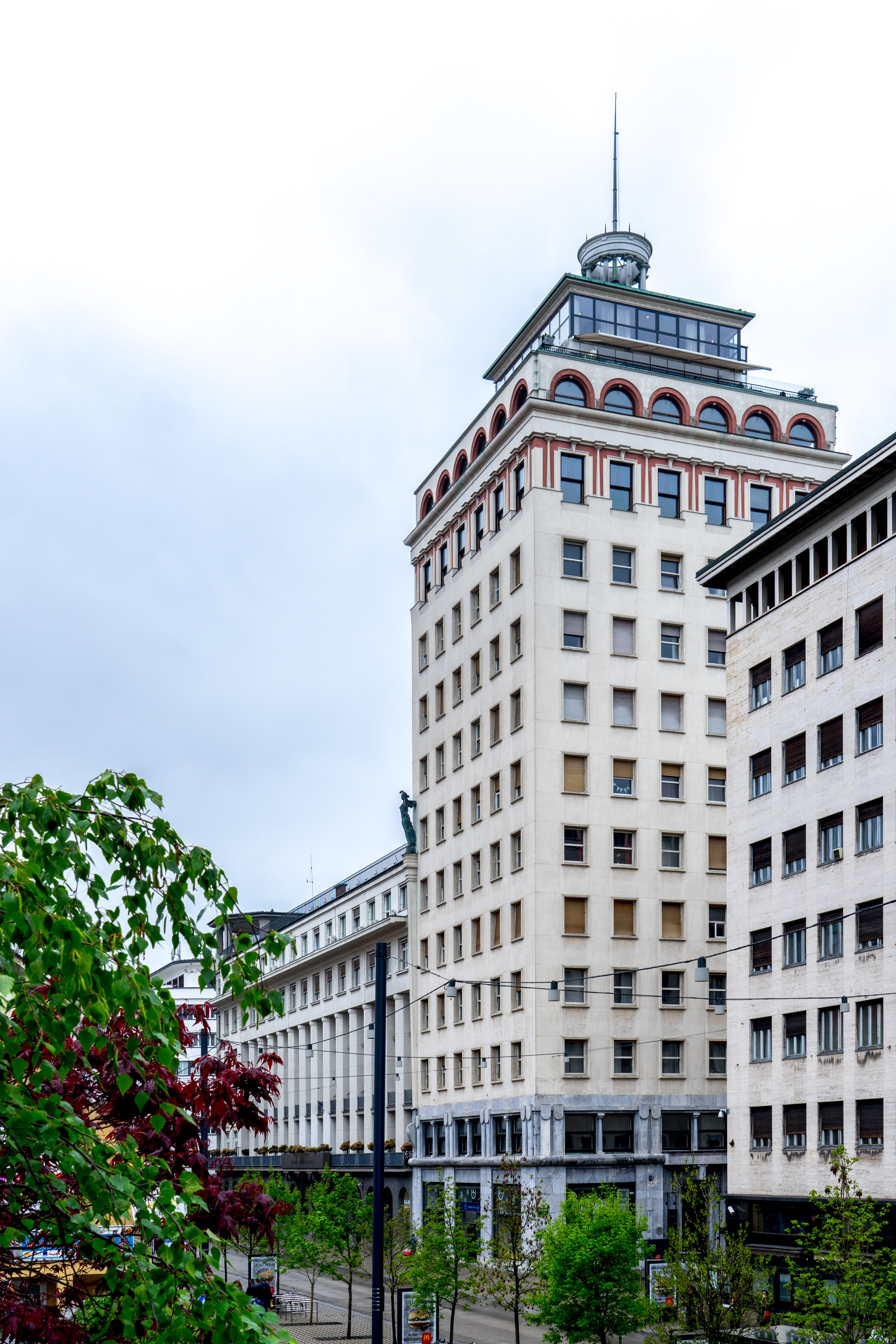 Neboticnik Tower